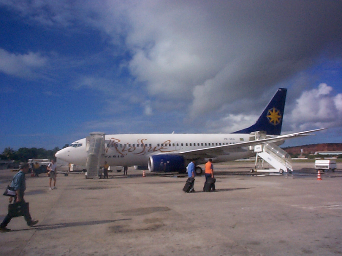 Varig Plane